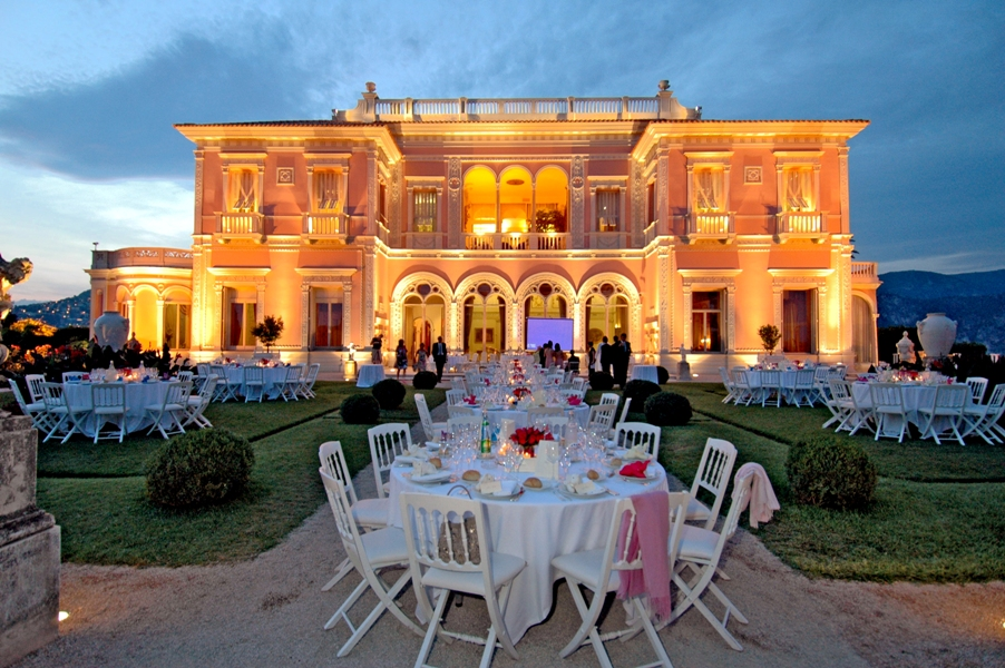 La villa vue de nuit